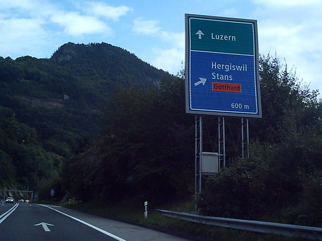 Swiss Frutiger Traffic Sign. DF08 2004 image.